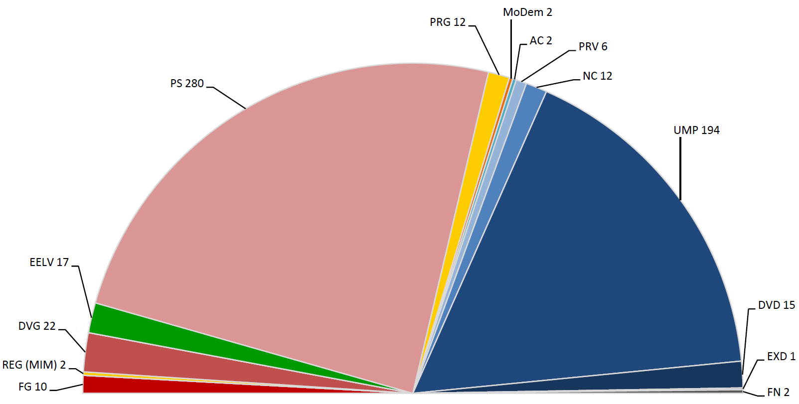 Composition de l'Assemblée nationale par étiquette politique pour la XIVe législature de la Cinquième République française, à l'issue des élections législatives de 2012.